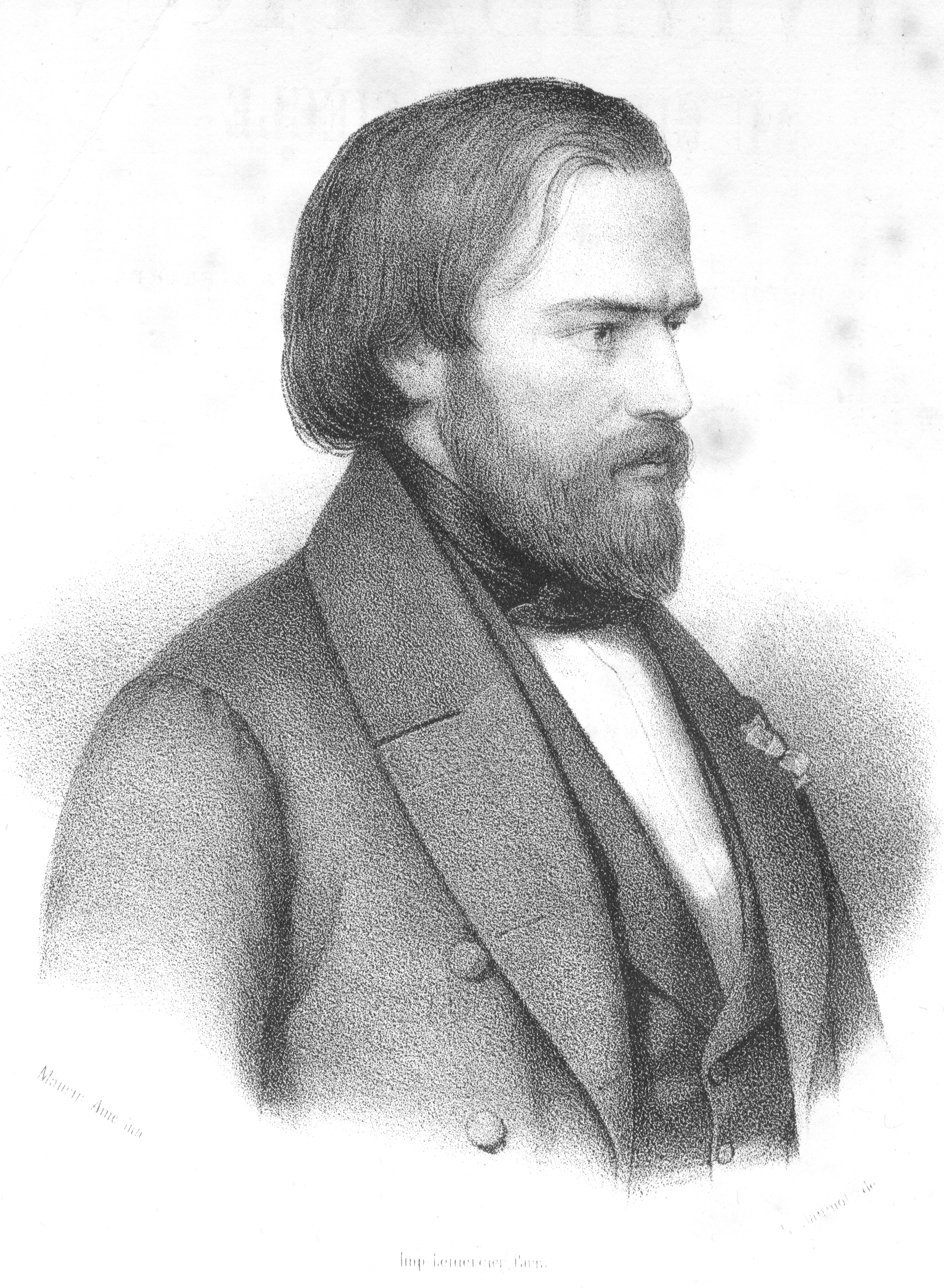 Portrait de Frédéric Ozanam, mis en frontispice de l'édition de ses oeuvres complètes (éditions Lecoffre, Paris, 1862)